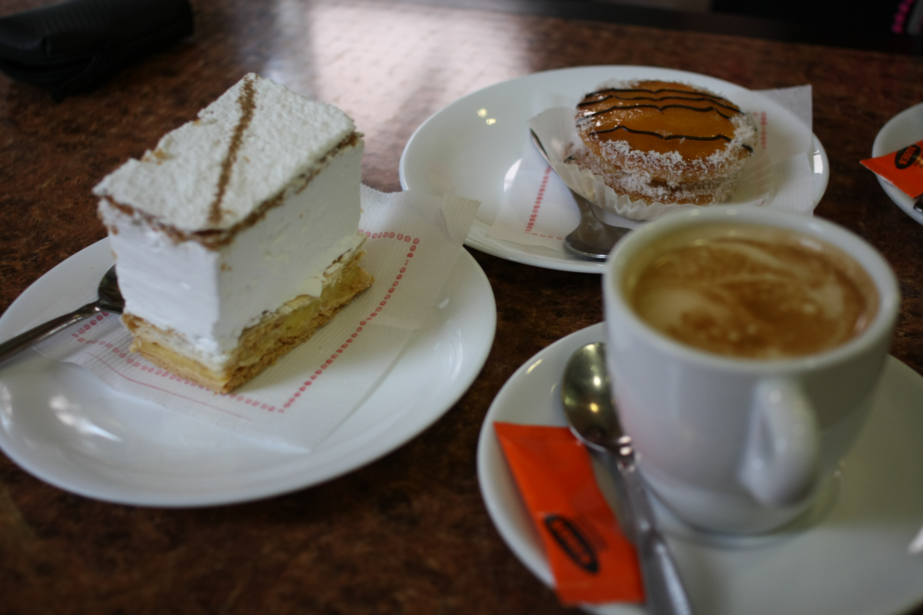 Un café acompañado de una milhoja y otro pastelillo, en Murcia.